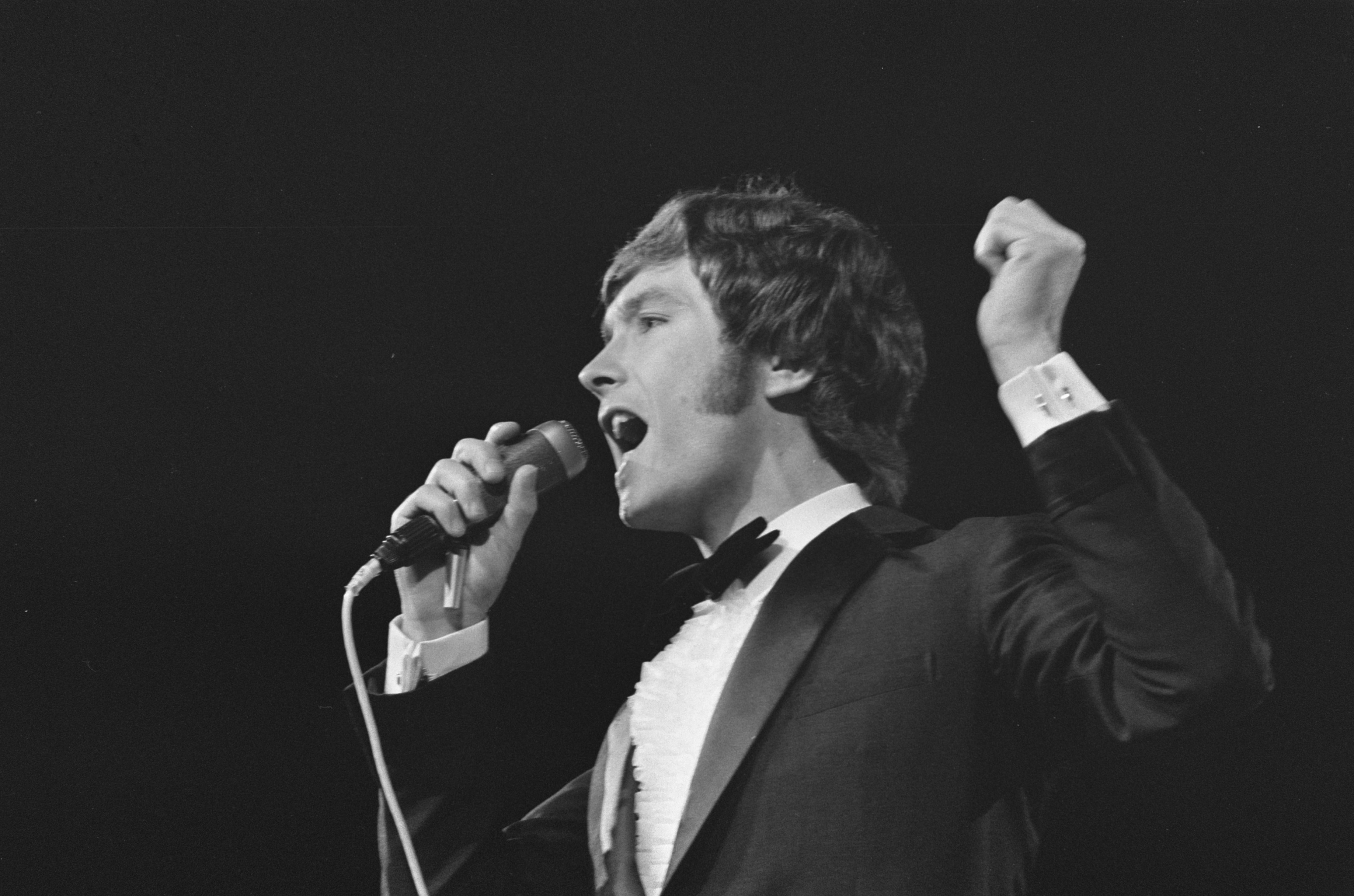 Collectie / Archief : Fotocollectie Anefo Reportage / Serie : [ onbekend ] Beschrijving : Grand Gala du Disque in RAI Amsterdam. J. Vincent Edwards Annotatie : Had in 1969 een hit met "Thanks" Datum : 27 februari 1970 Locatie : Amsterdam, Noord-Holland Persoonsnaam : Edwards, J. Vincent Instellingsnaam : RAI Fotograaf : Mieremet, Rob / Anefo, [onbekend] Auteursrechthebbende : Nationaal Archief Materiaalsoort : Negatief (zwart/wit) Nummer archiefinventaris : bekijk toegang 2.24.01.05 Bestanddeelnummer : 923-3027